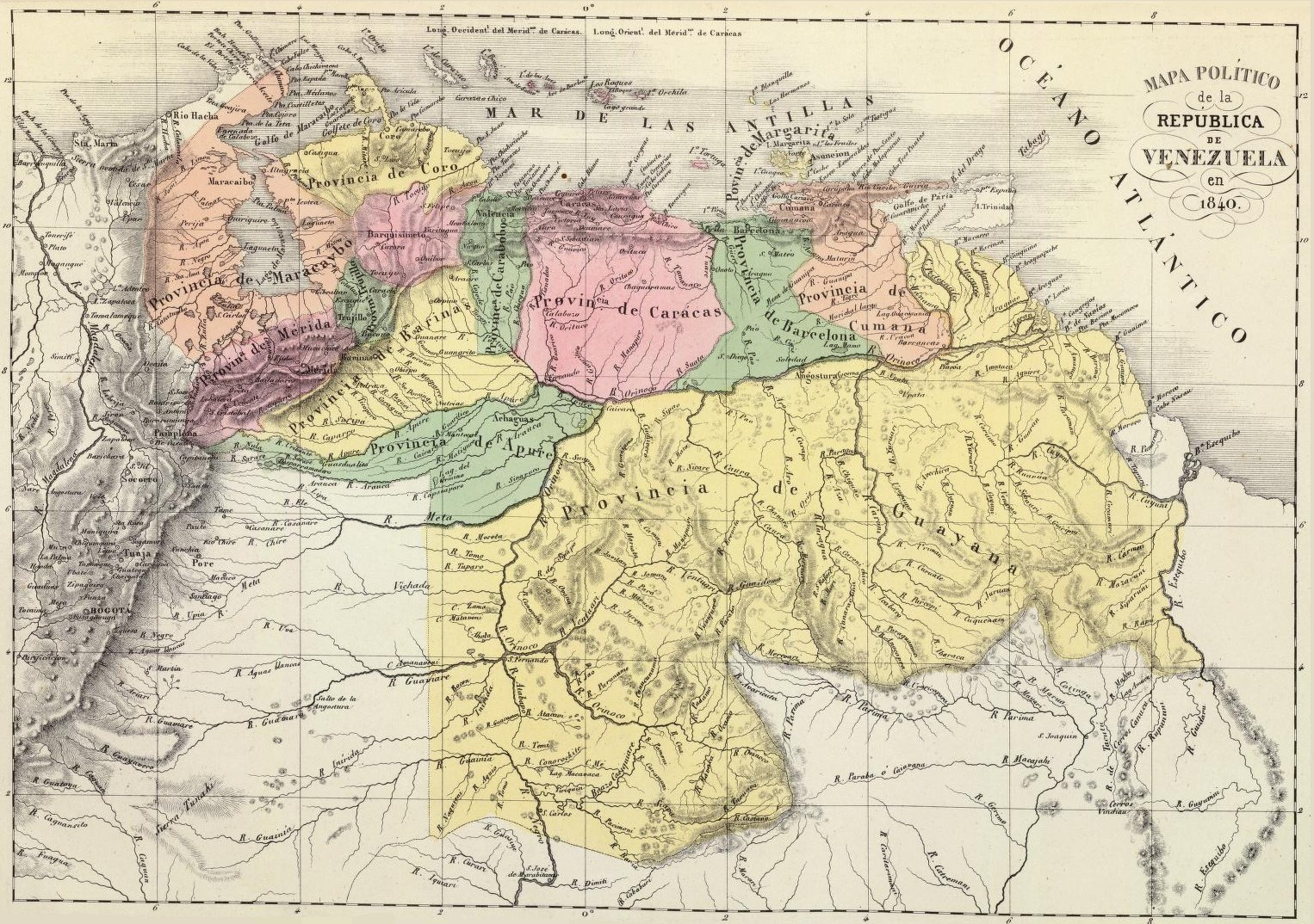 Mapa político de Venezuela en 1840. Tomado del "Atlas físico y político de la República de Venezuela", 1840.